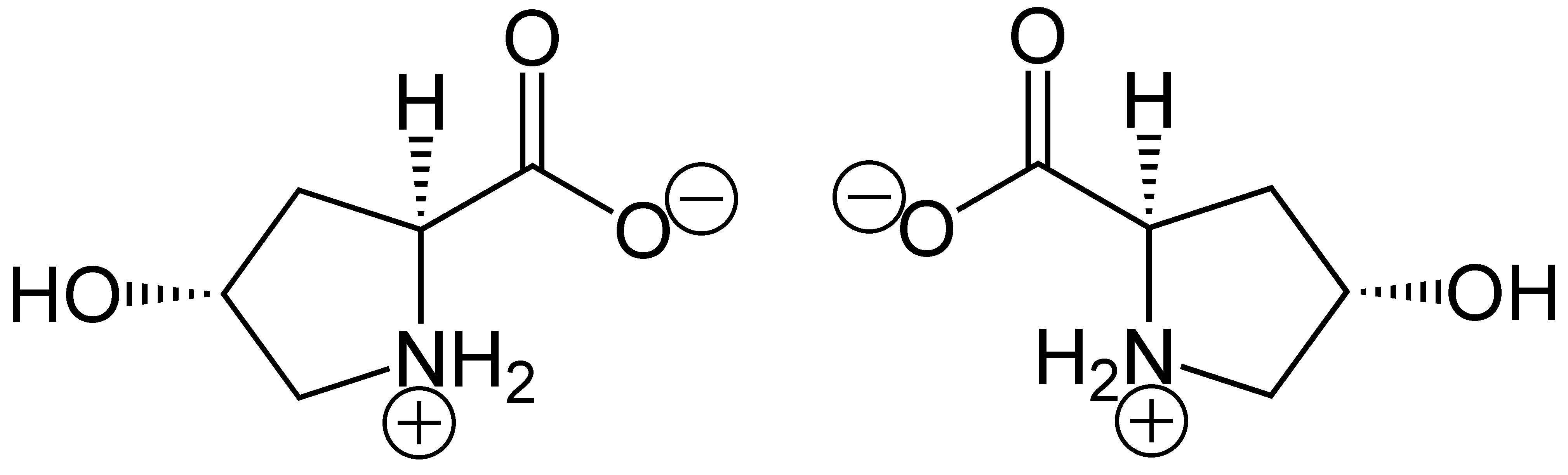 Betain-Hydroxyprolin